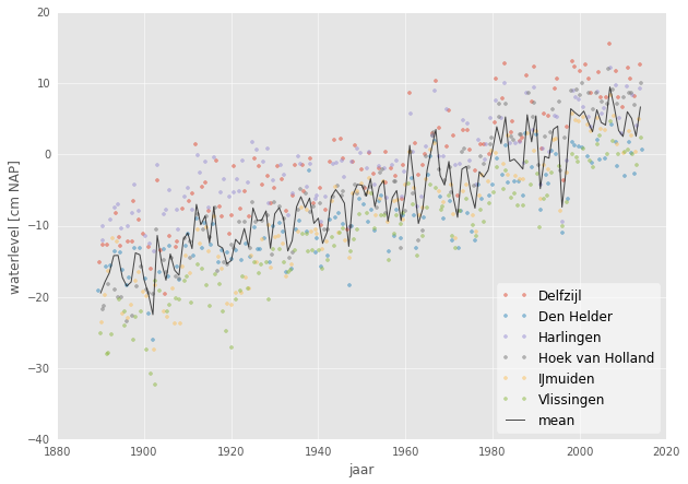 Jaargemiddelde zeespiegel gemeten met getijde stations ten opzichte van het RLR (teruggerekend tot pre-2005 NAP) voor de Nederlandse hoofdstations. Data komt van (aangeleverd door Rijkswaterstaat). Figuuris gemaakt met deze notebook .